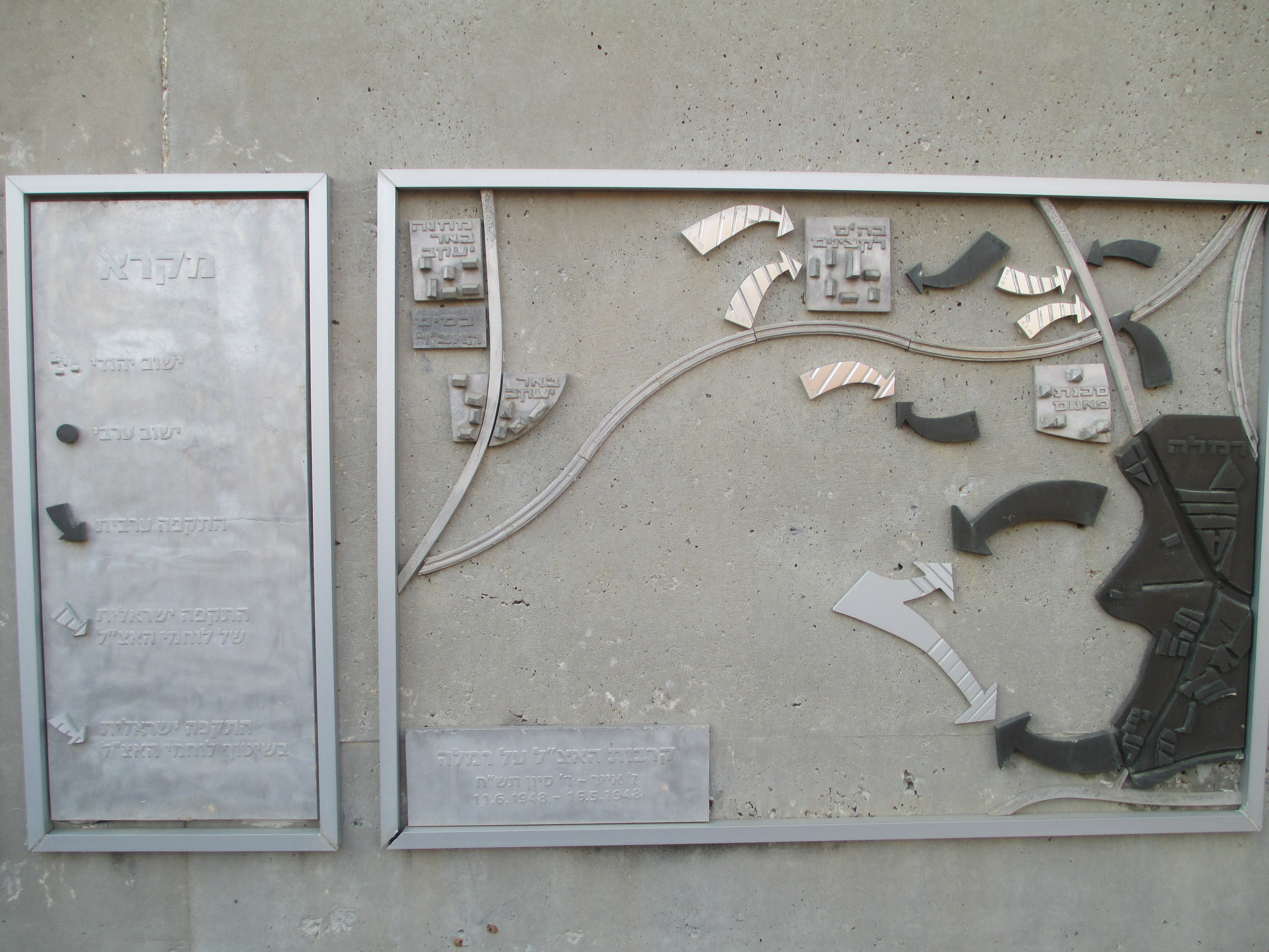 מפת התקפות אצ"ל ברמלה - באנדרטת אצ"ל ברמלה